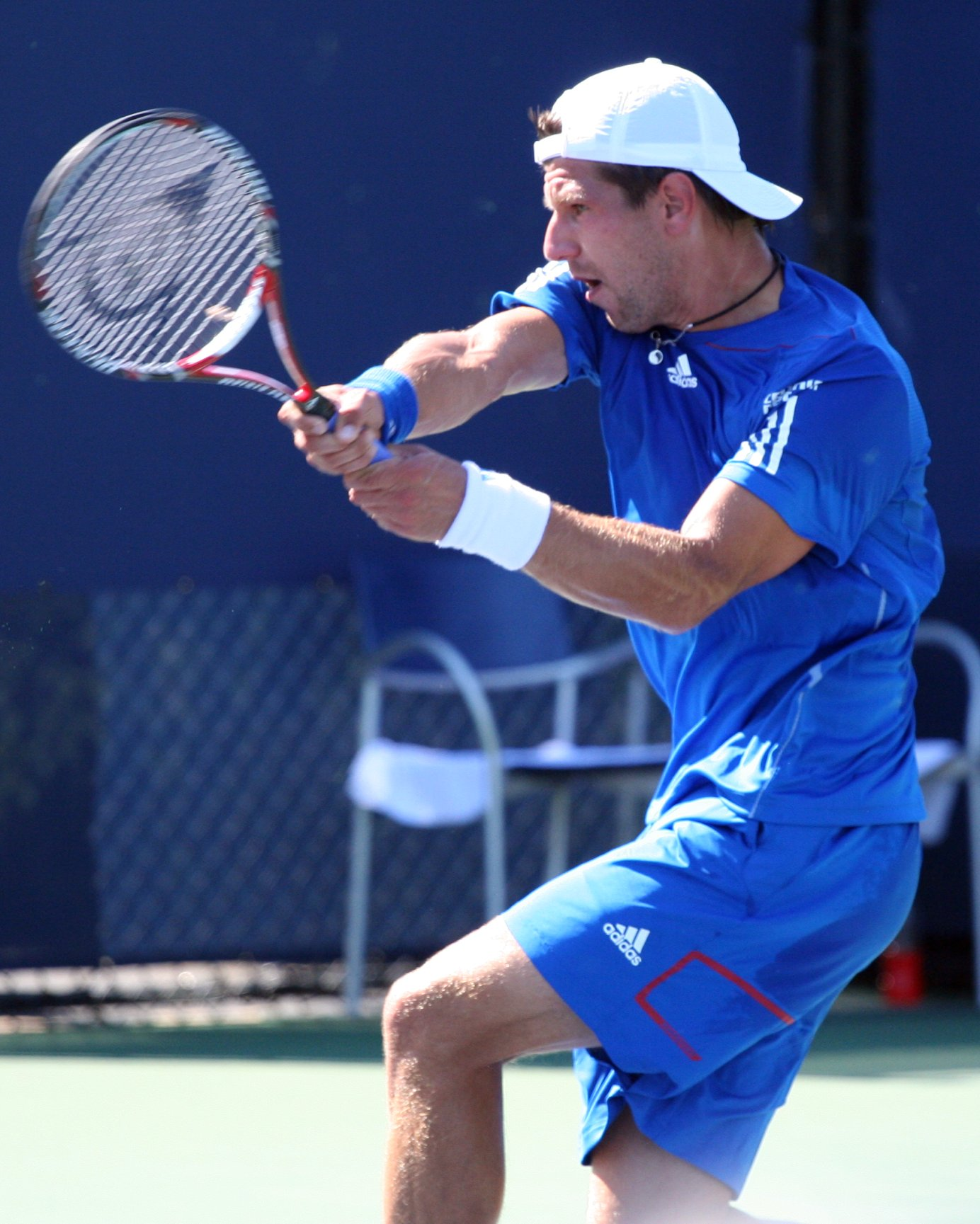 U.S. Open Aug. 30, 2010